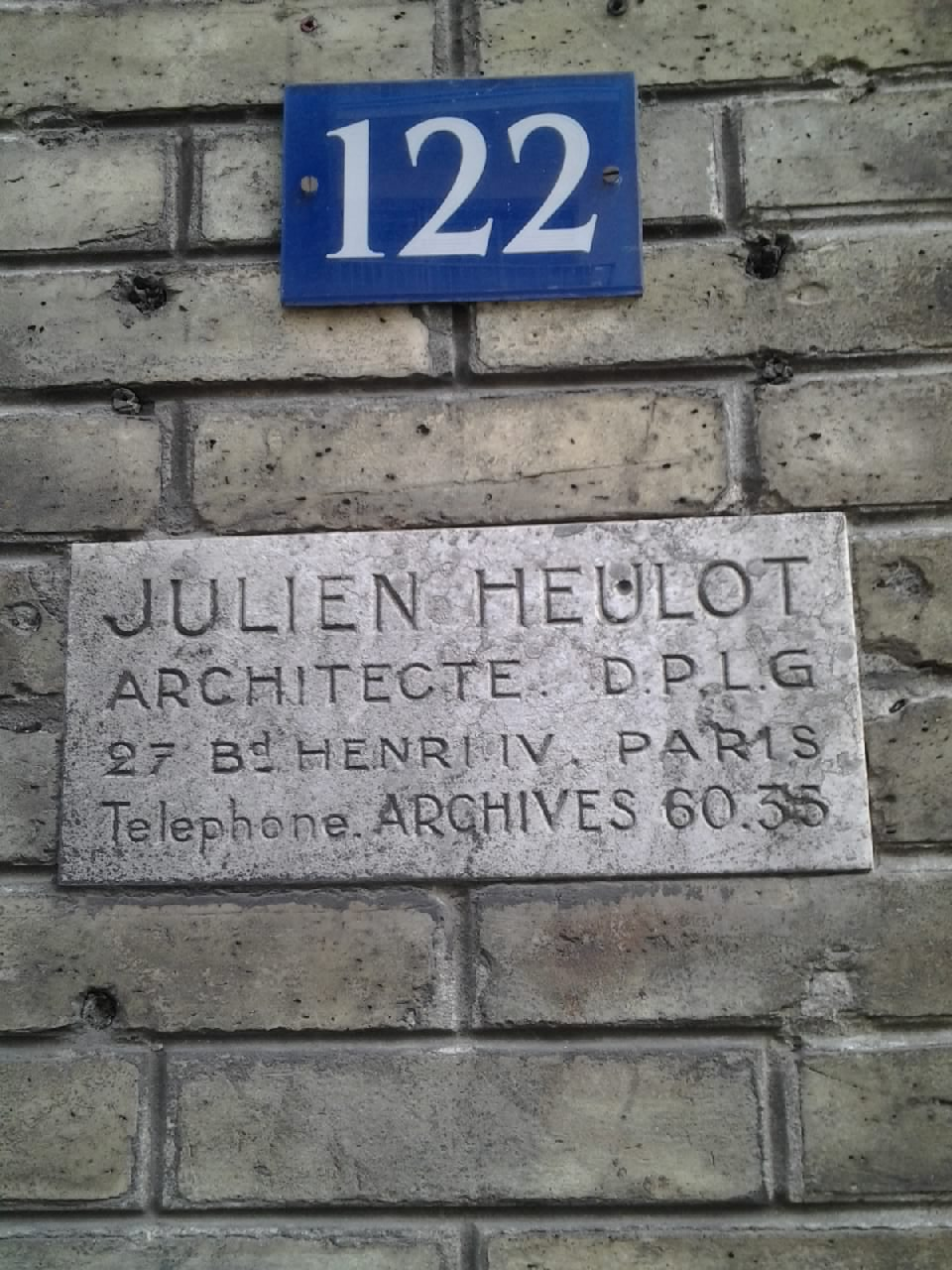 Plaque professionnelle de l'architecte Julien HEULOT. Boulevard de Champigny, 122 (ex 82) - St Maur des Fossés (94).